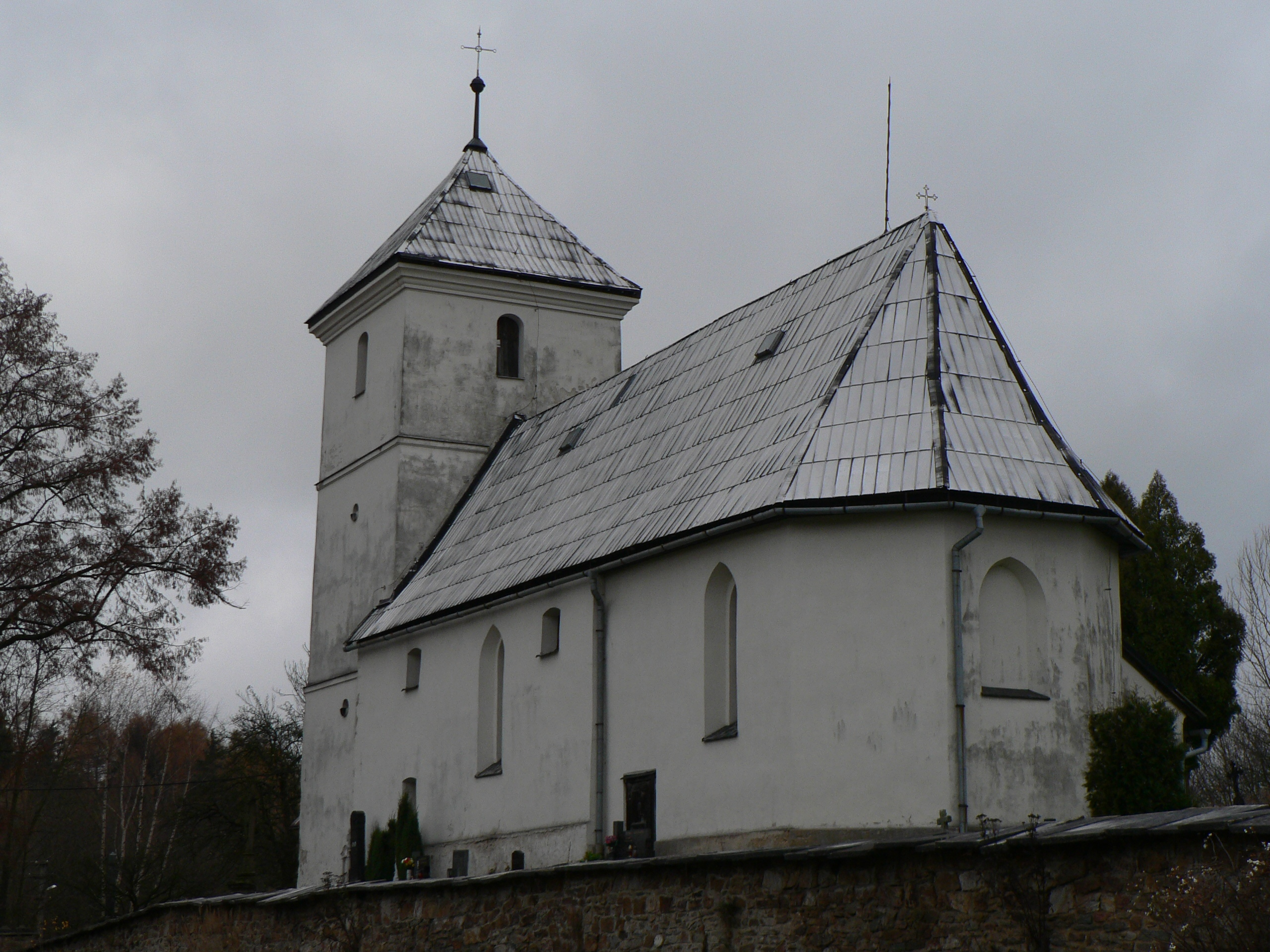 Kostel svatého Volfganga (Vikantice)